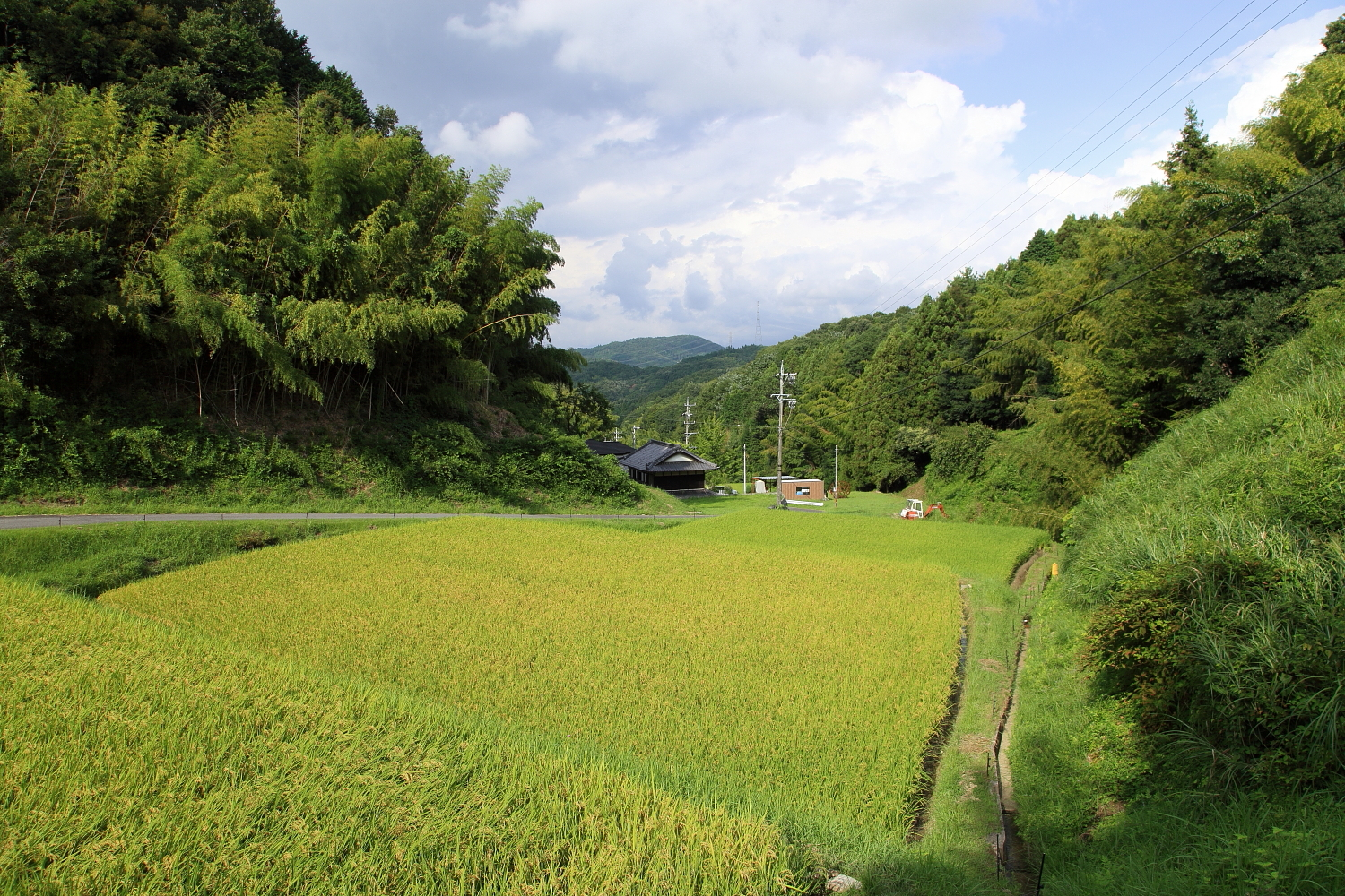 豊田市上脇町（2011年）